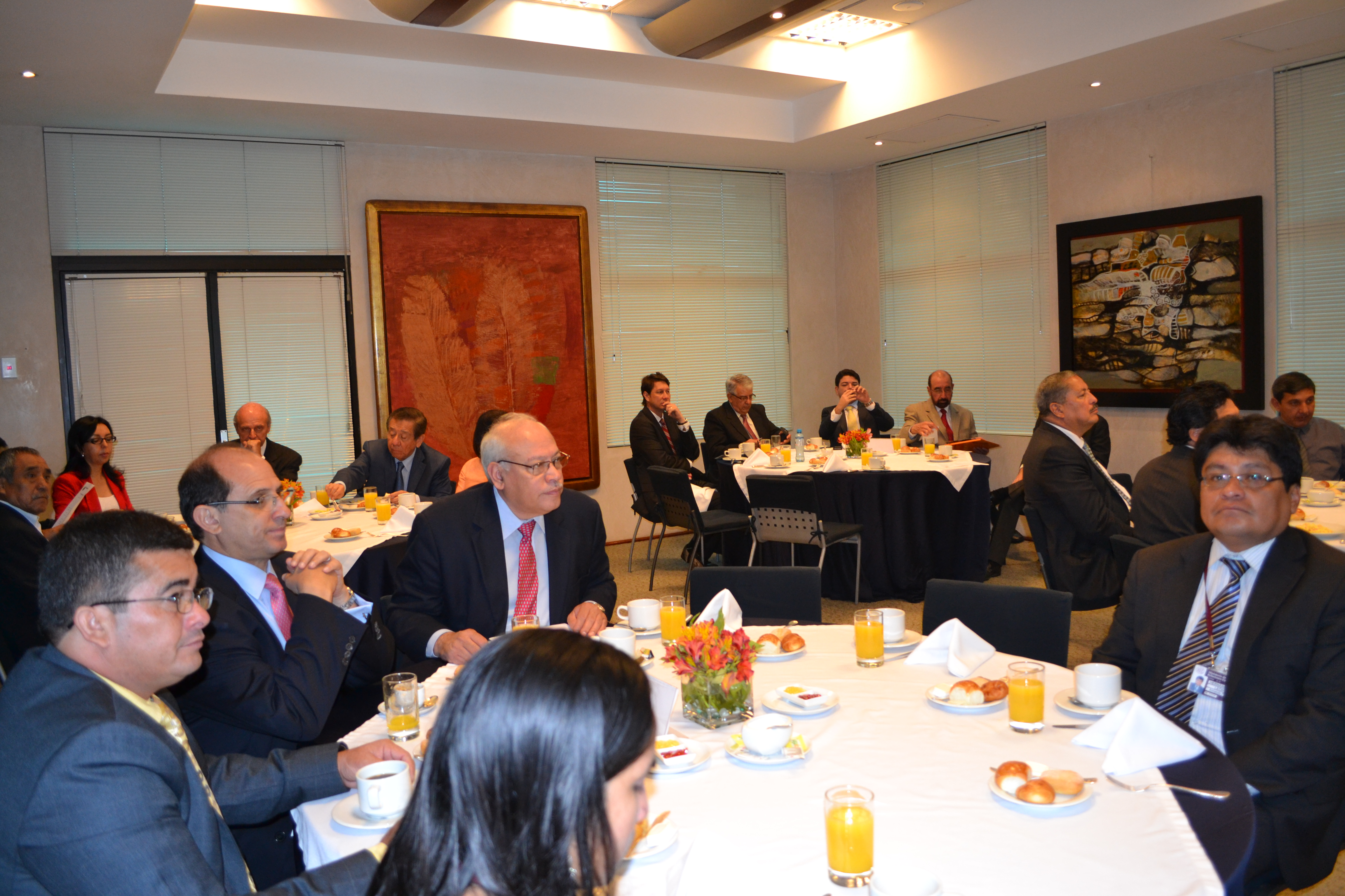 Reunión de la CONFIEP en el distrito de San Isidro.